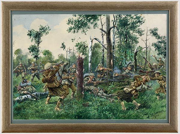 Spähtruppgefecht.